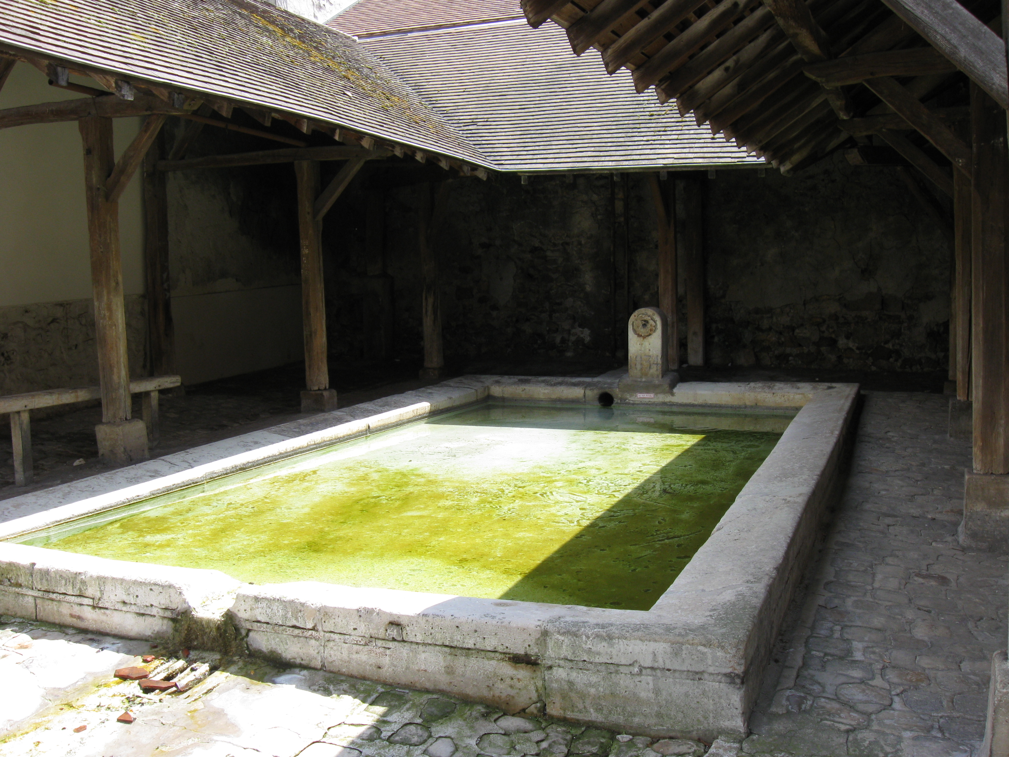 Lavoir de Lagny-sur-Marne, XIXe siècle (Seine-et-Marne, région Île-de-France).